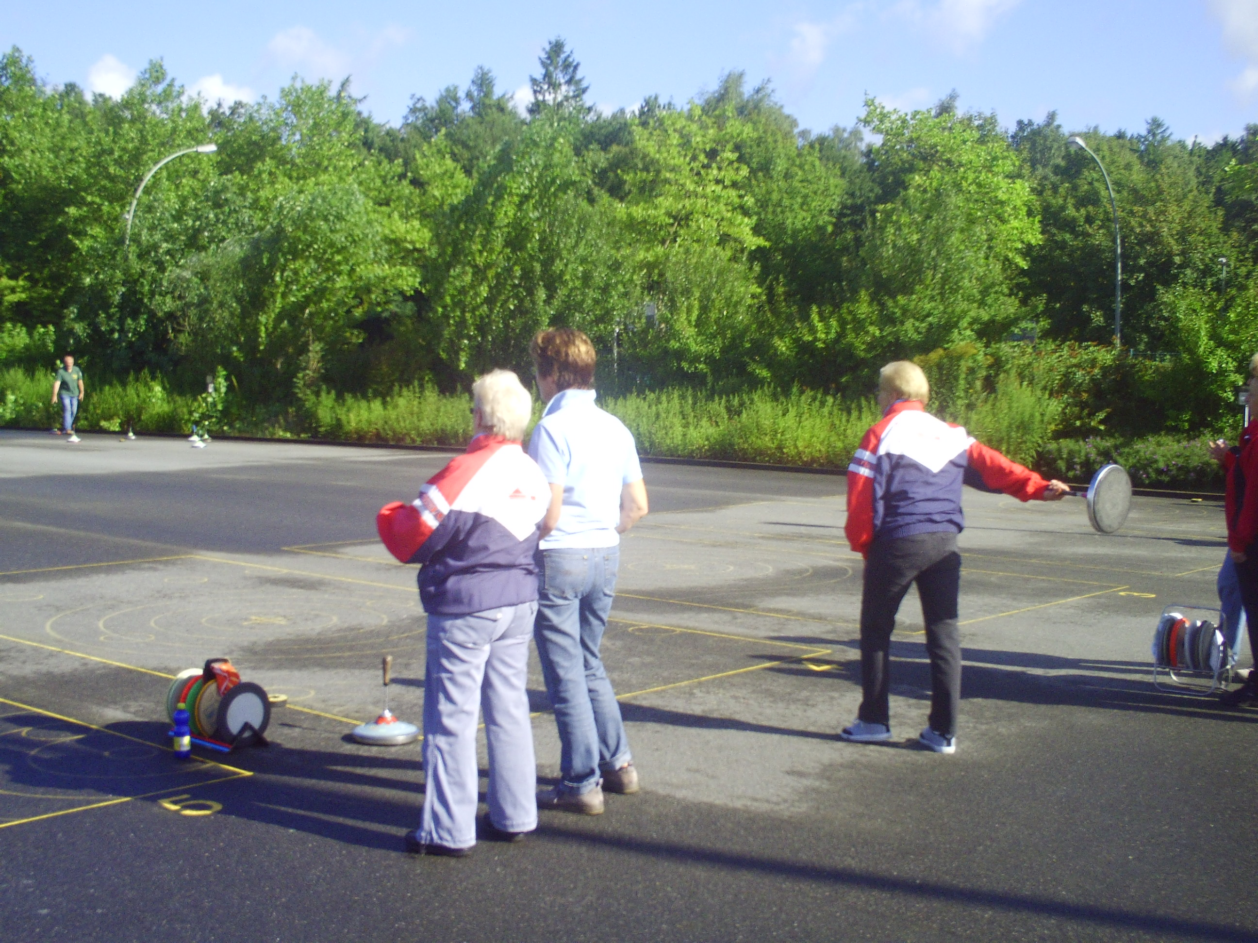 Aufnahme von der Landesmeisterschaft Eisstockschießen in Schleswig-Holstein